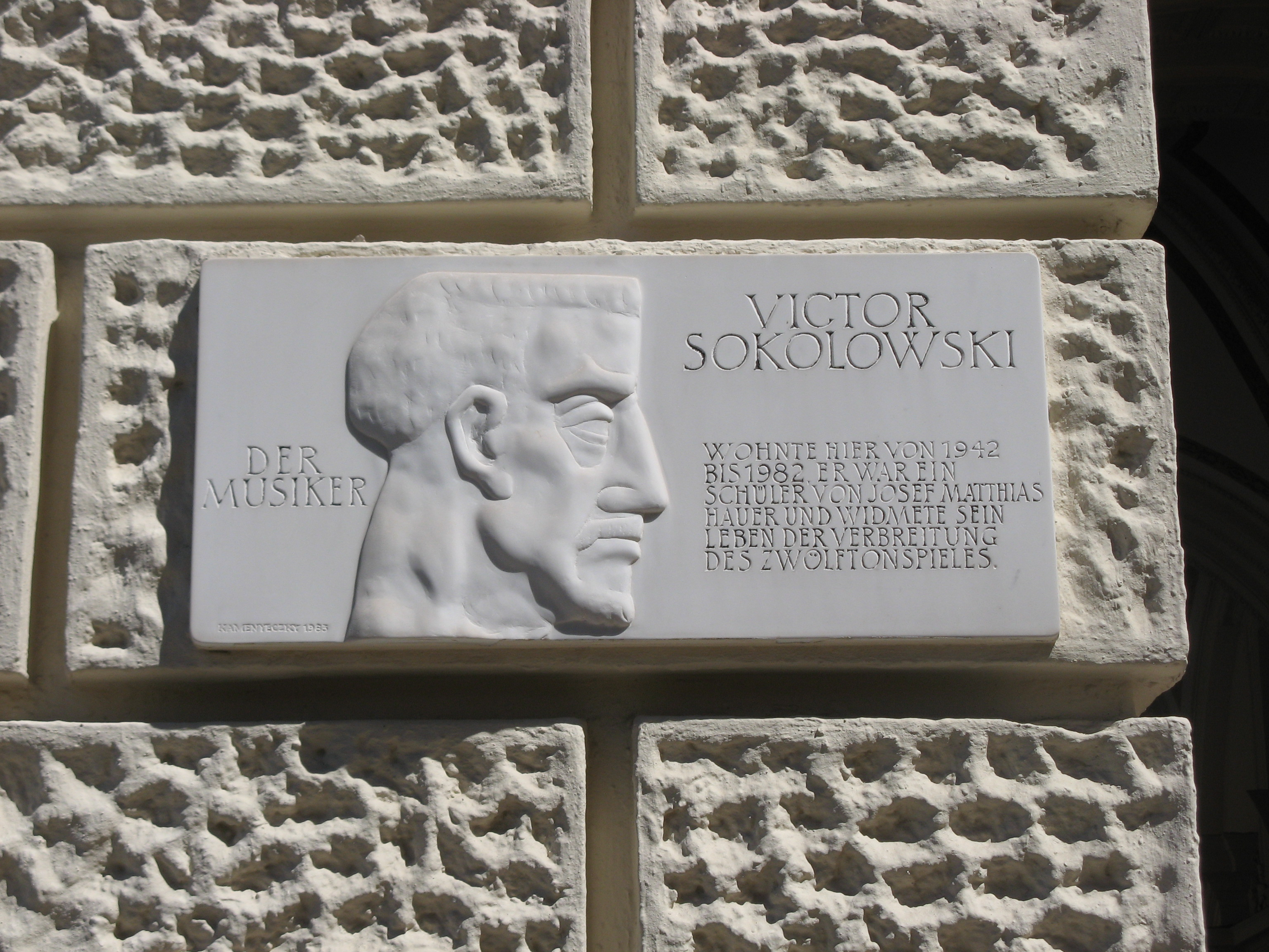 Gedenktafel für Victor Sokolowski, Lichtenfelsgasse 5-7, Wien-Innere Stadt